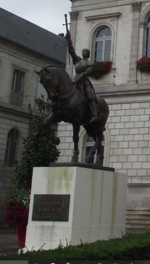 Reiterstatue der Jeanne d’Arc vor dem Hôtel de ville in Vaucouleurs